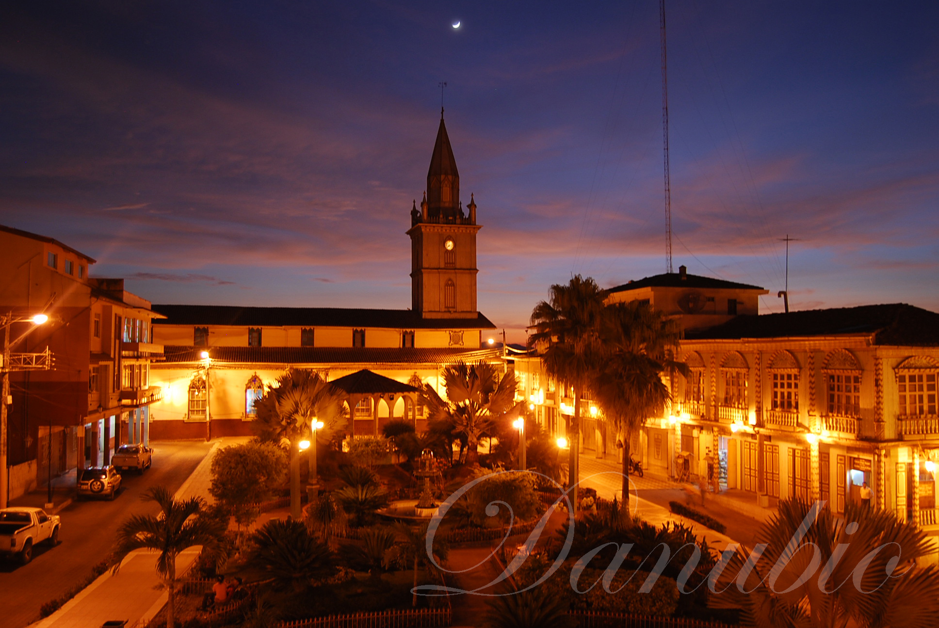 Cayendo la noche en la Plaza de la Independencia